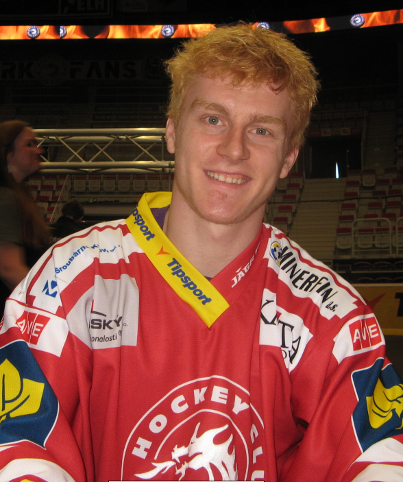 Po zakončení sezóny 2014/15 ve Werk Areně